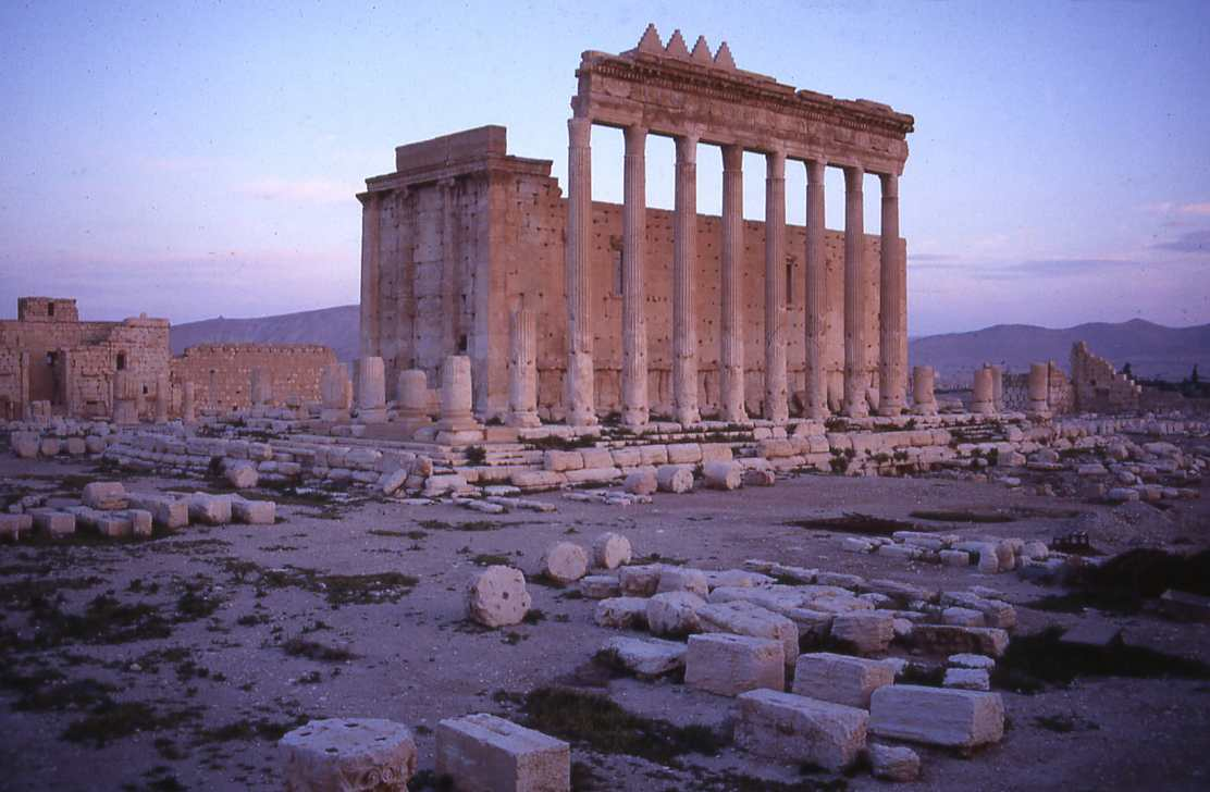 Palmyre. temple de Bel/Baal, Ier siècle. Photo Ginolerhino 1992